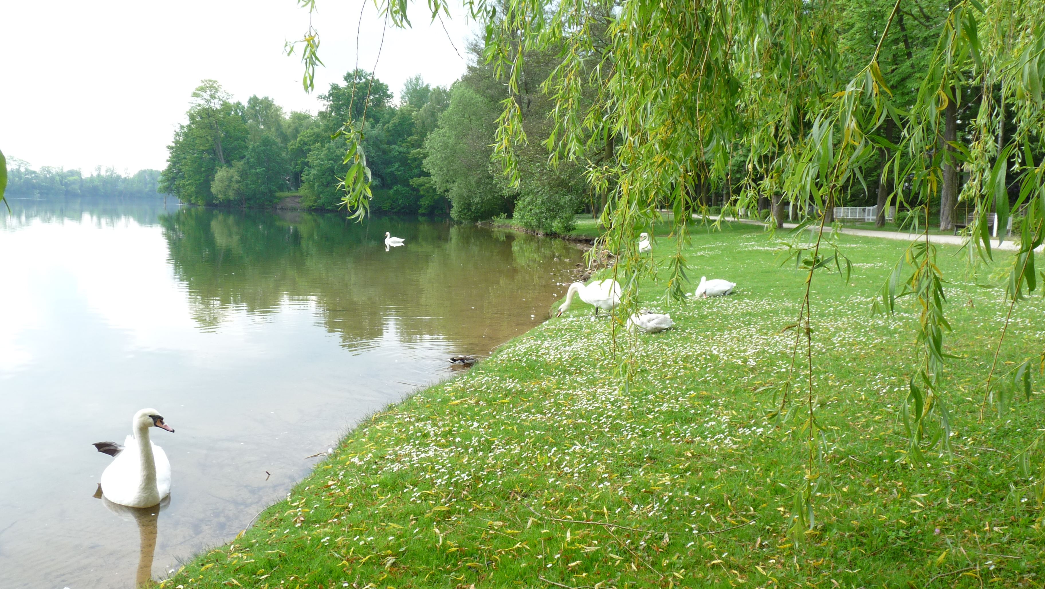 Schwäne am Scharmützelsee in Bad Saarow.